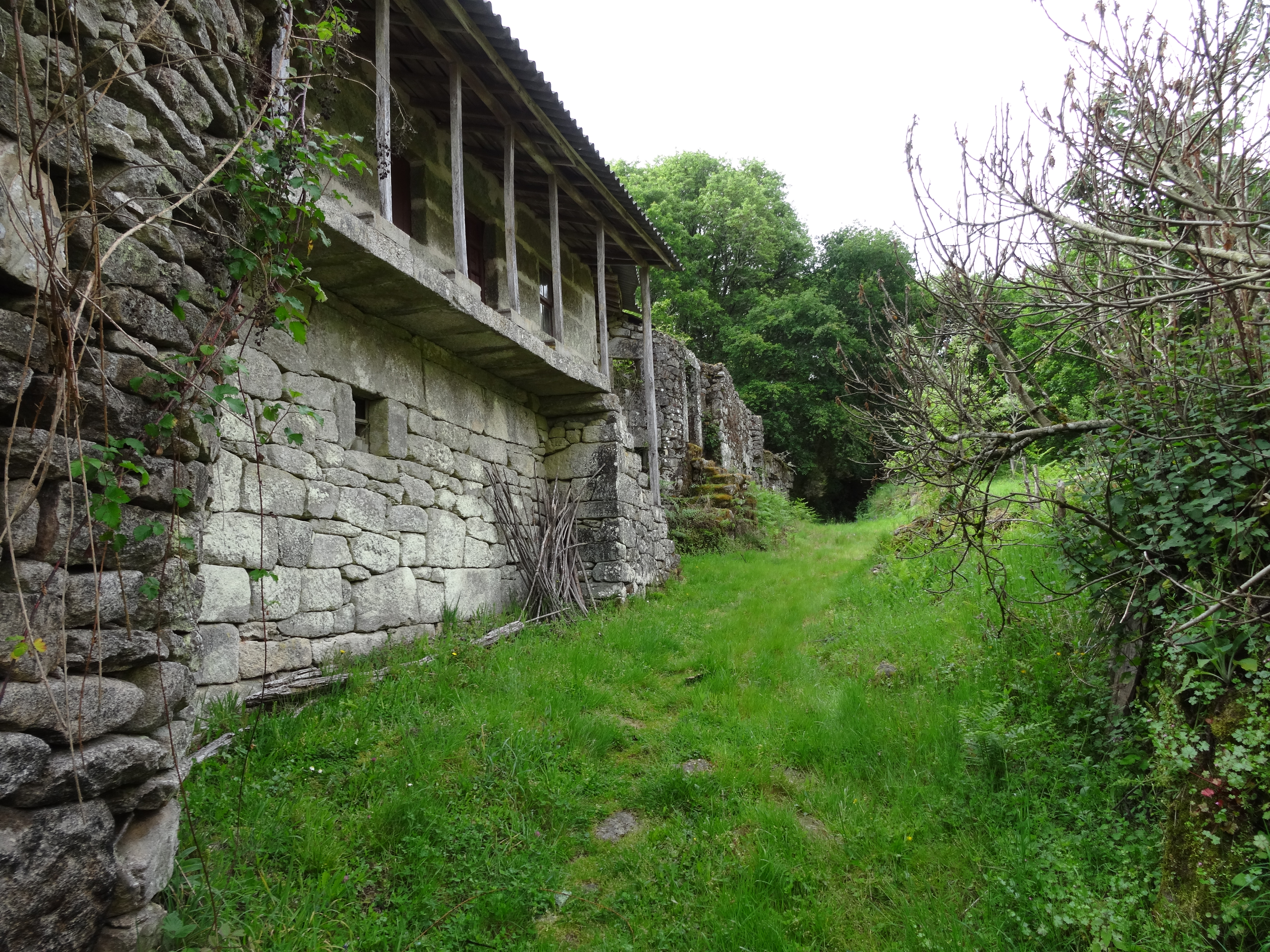 Ver título.